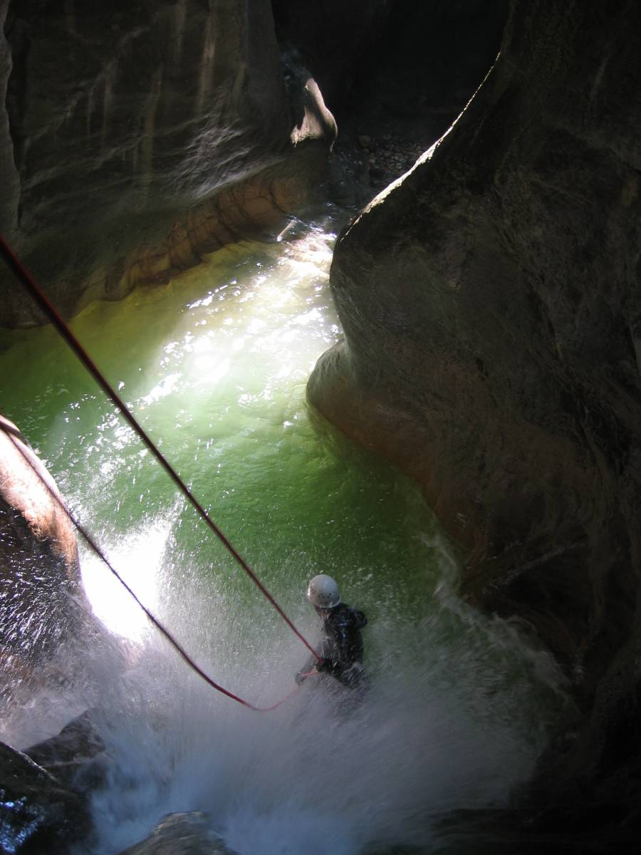 Canyoning dans les gorges du Pont du Diable (Nant de Bellecombe, communes de Bellecombe-en-Bauges et Lescheraines)